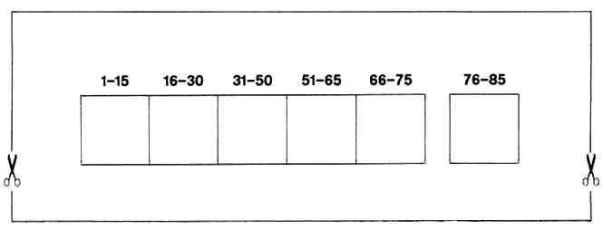 Wahlzettel für Musik ist Trumpf, Teil 2